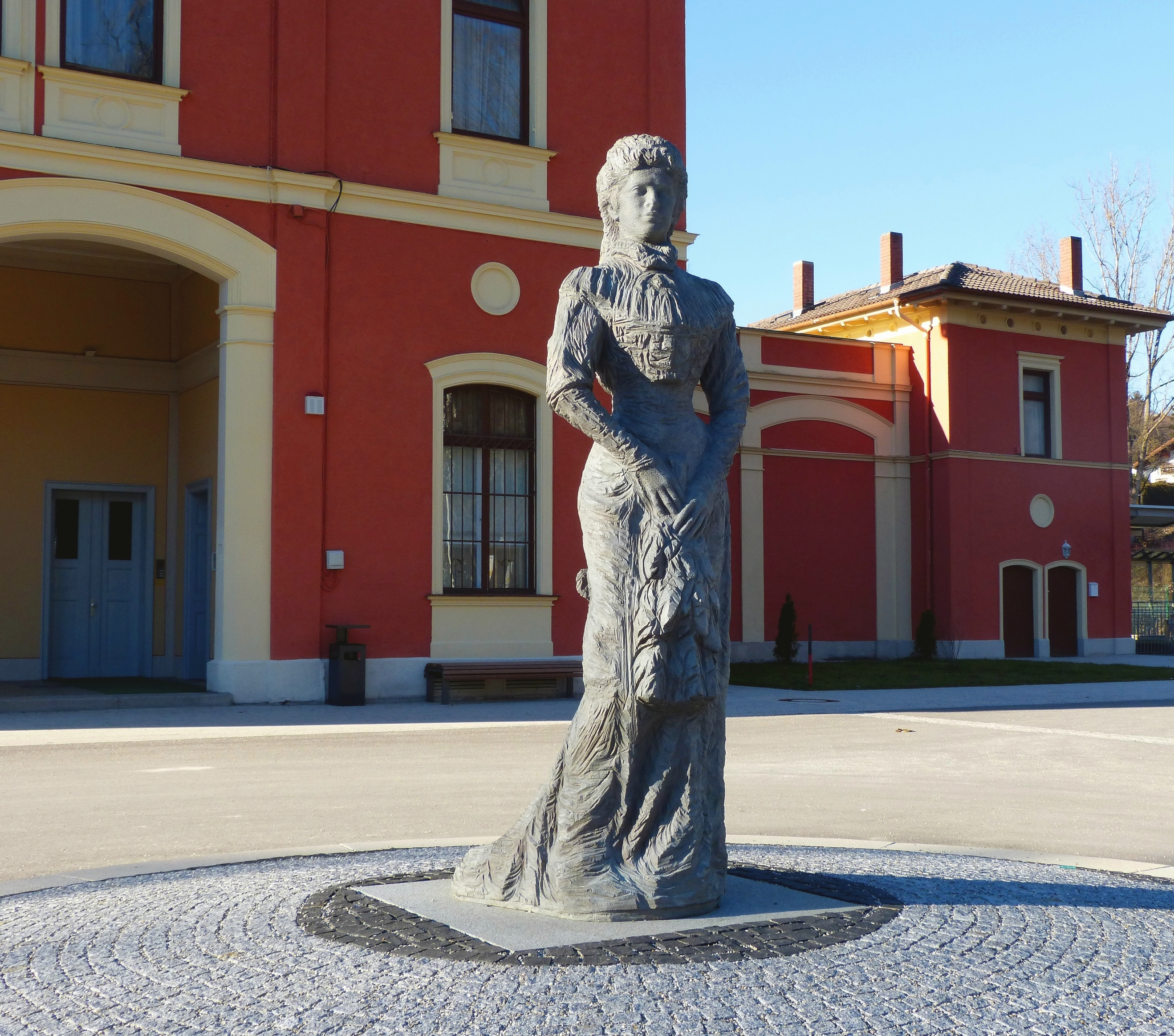 Pöcking, OT Possenhofen, Kaiserin-Elisabeth-Museum im ehemaligen Empfangsgebäude des Bahnhofs Possenhofen. Die Bronzestatue der Kaiserin auf dem Vorplatz des Gebäudes ist ein Werk des Pöckinger Bildhauers Jozek Nowak.